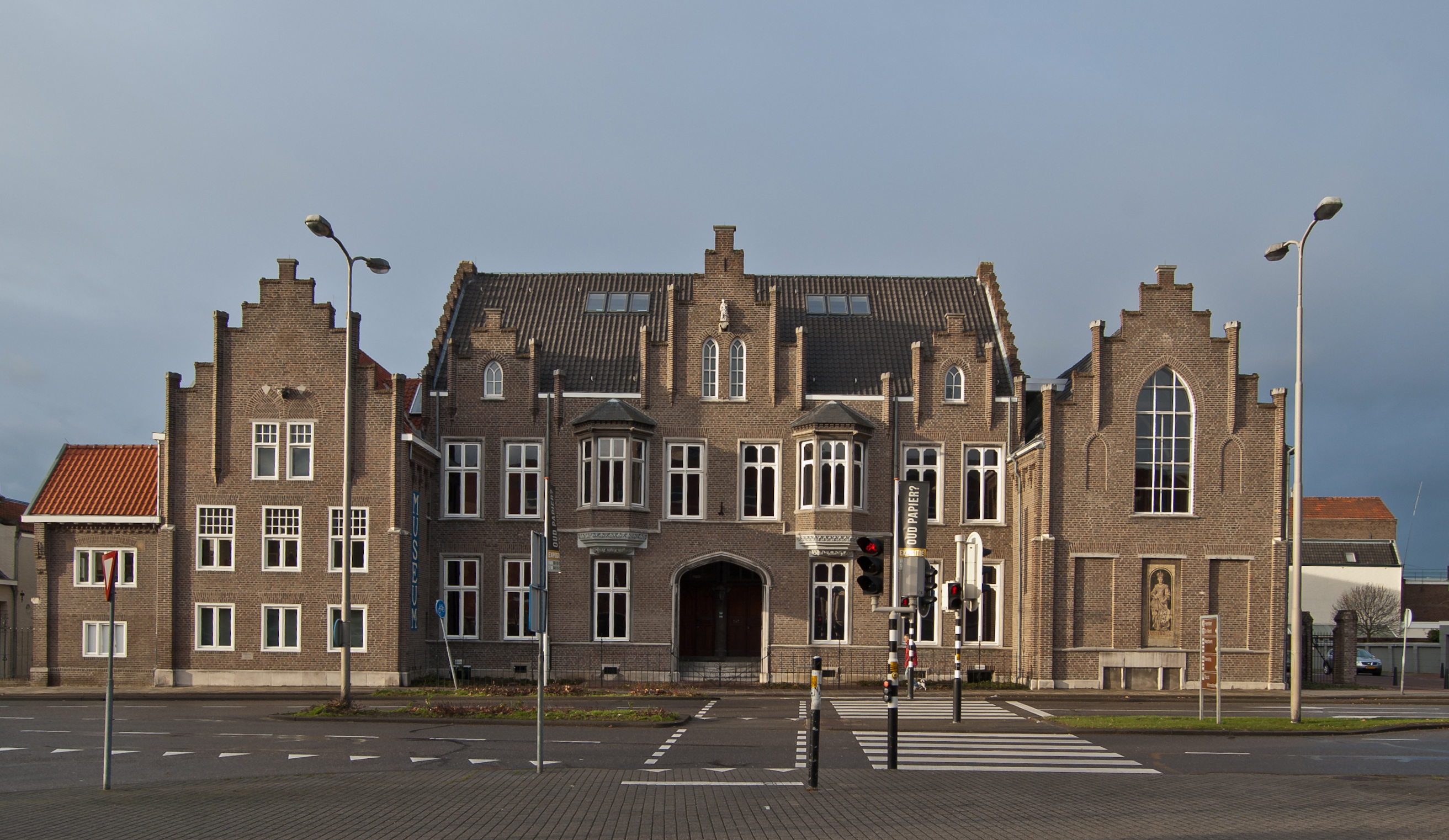 Wohn-, Atelier- und Werkstattgebäude des niederländischen Architekten Pierre Cuypers in Roermond, heute Stedelijk Museum.